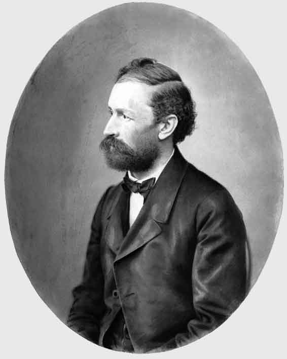 Portrait des Karl Friedrich Würthle